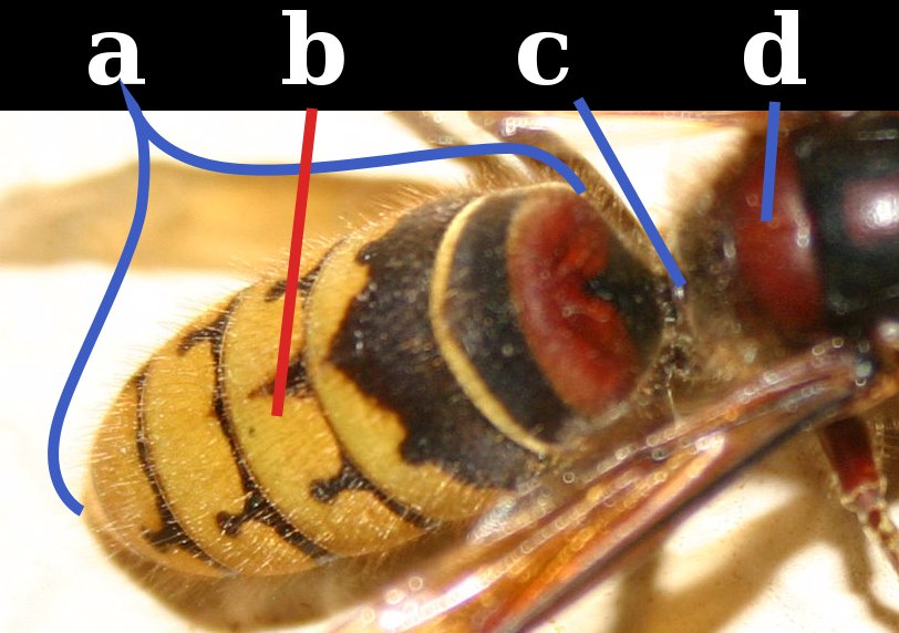 see legend below